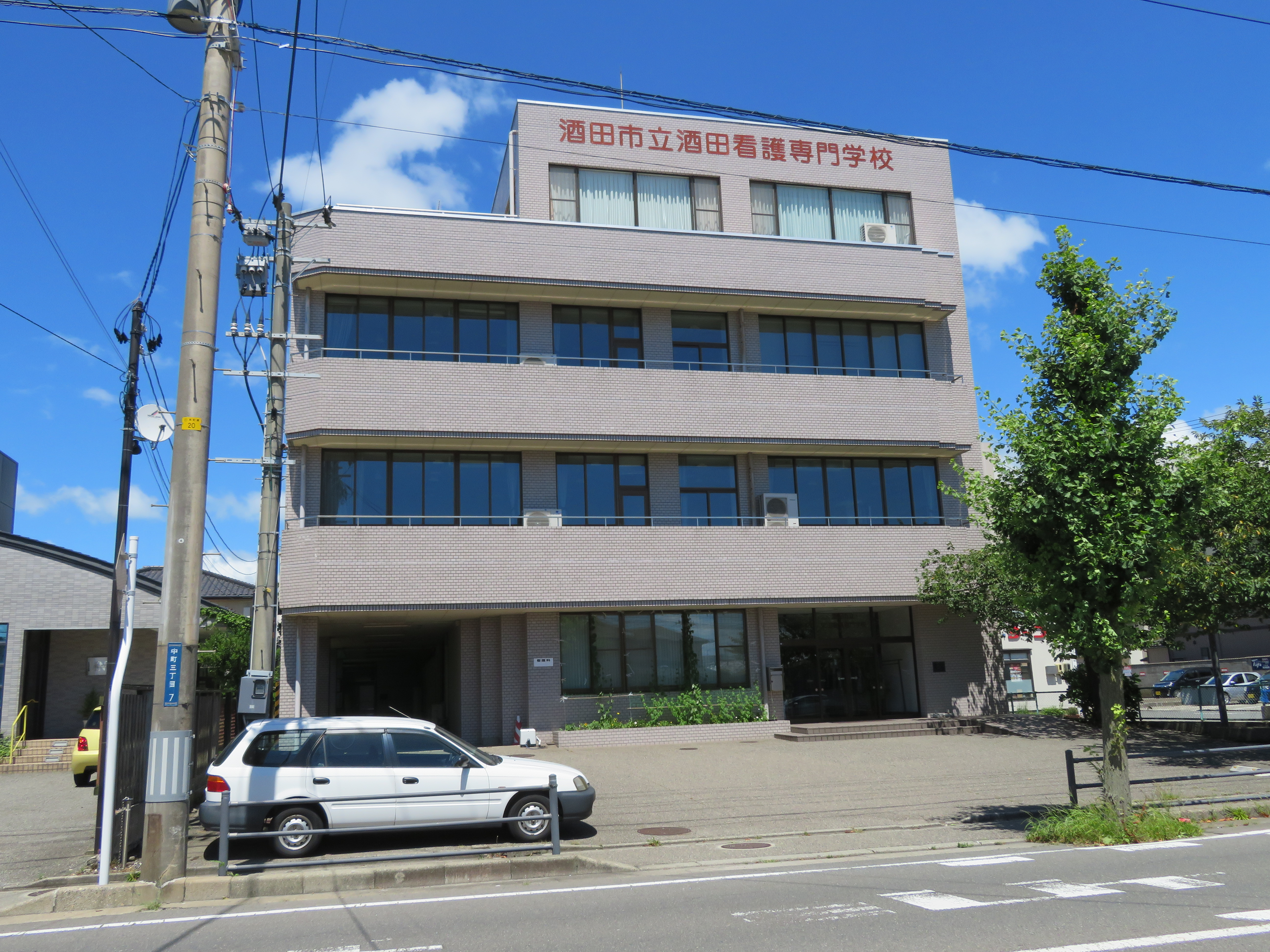 山形県酒田市に所在する酒田市立酒田看護専門学校 Canon PowerShot SX720 HS